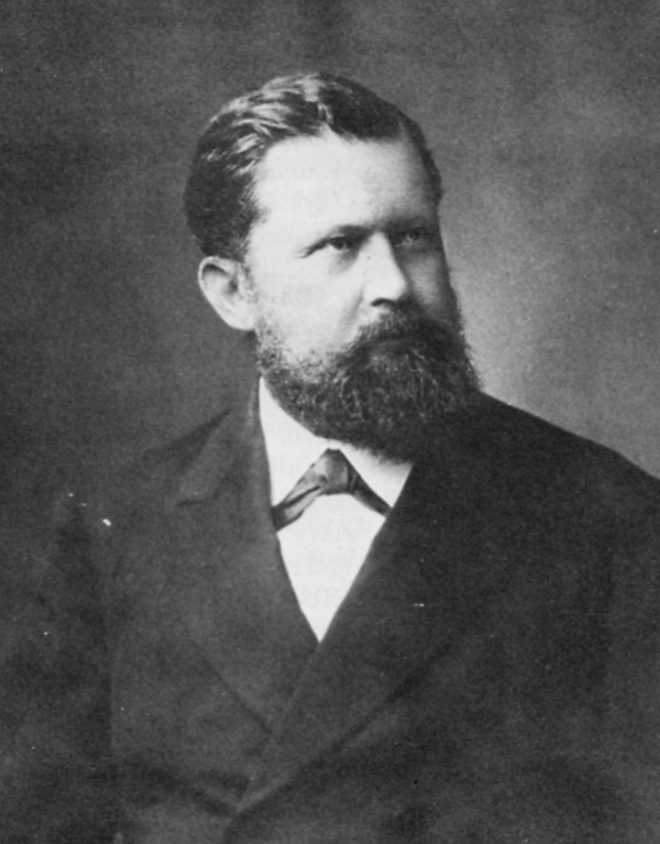 Emil Ege (1833–1893), Landtagsabgeordneter und Pächter des Schwärzerhofes bei Möckmühl